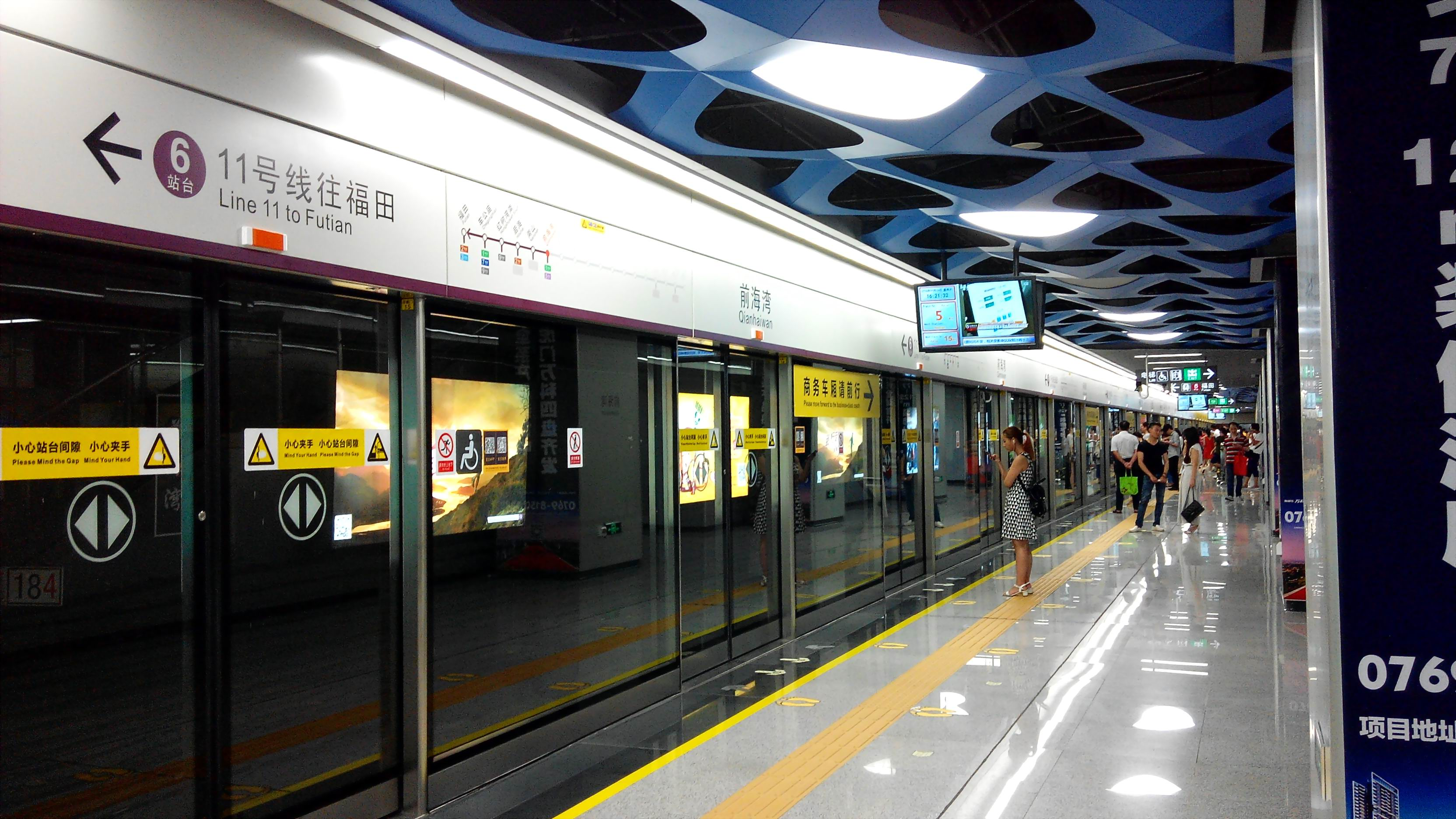 深圳地铁11号线 前海湾站 站台